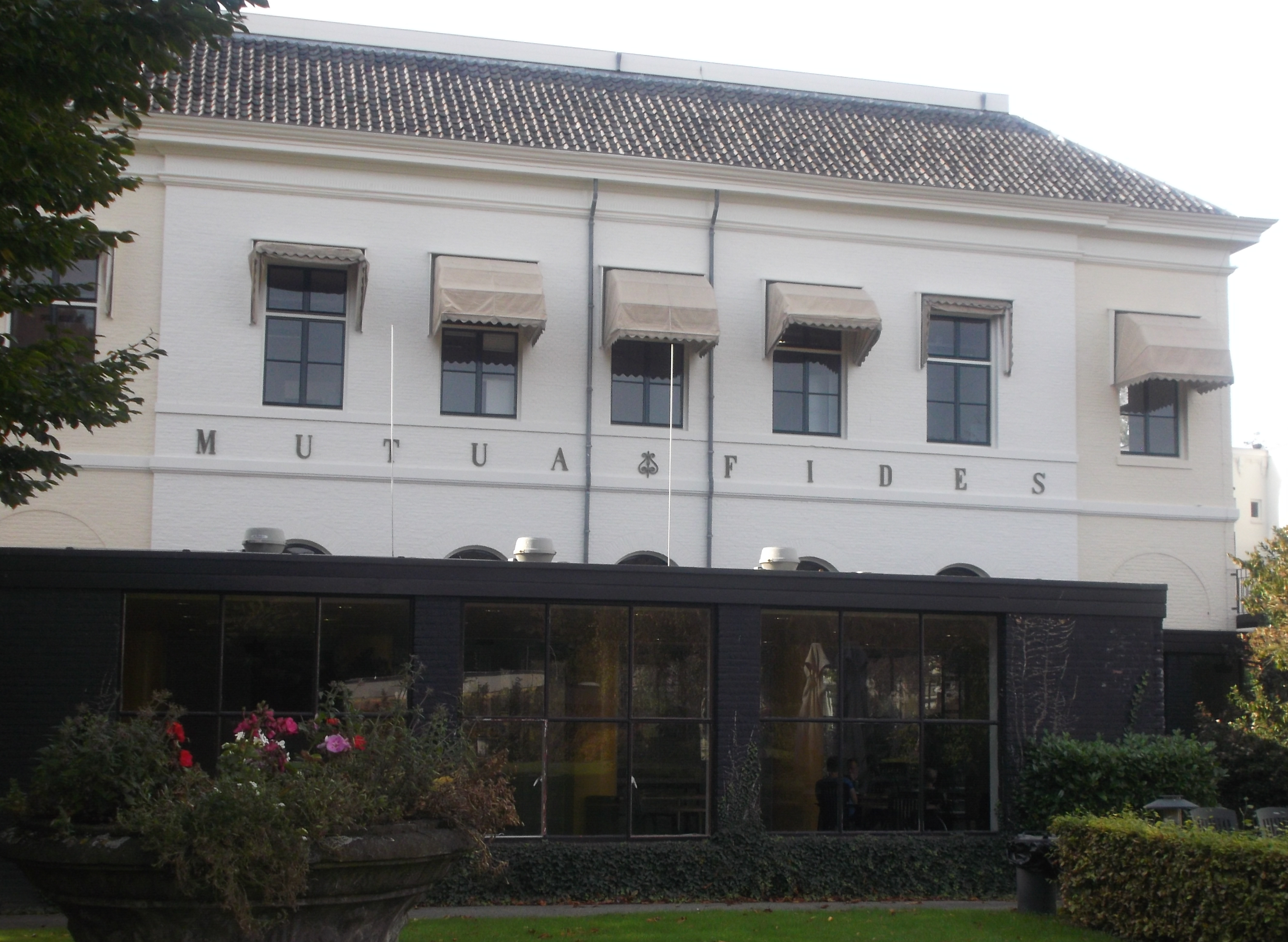 Mutua Fides, 1722 (paviljoen, behorend bij de Wilbert)